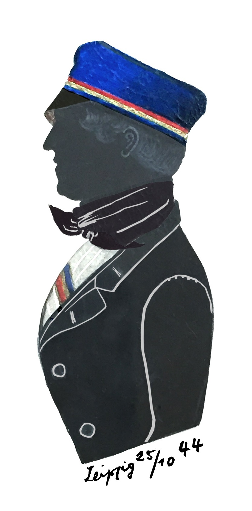 Schattenriss des Philologen Wilhelm Gesenius